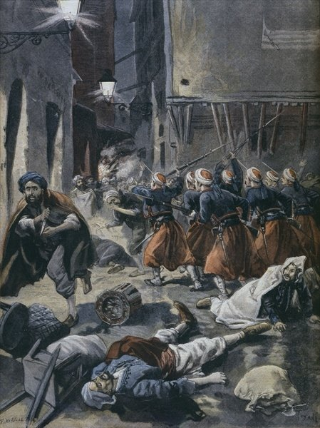 Anti-semitic riots in Algiers 1898 illustration from 'Le Petit Journal'